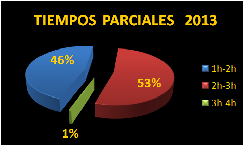 estadisticas